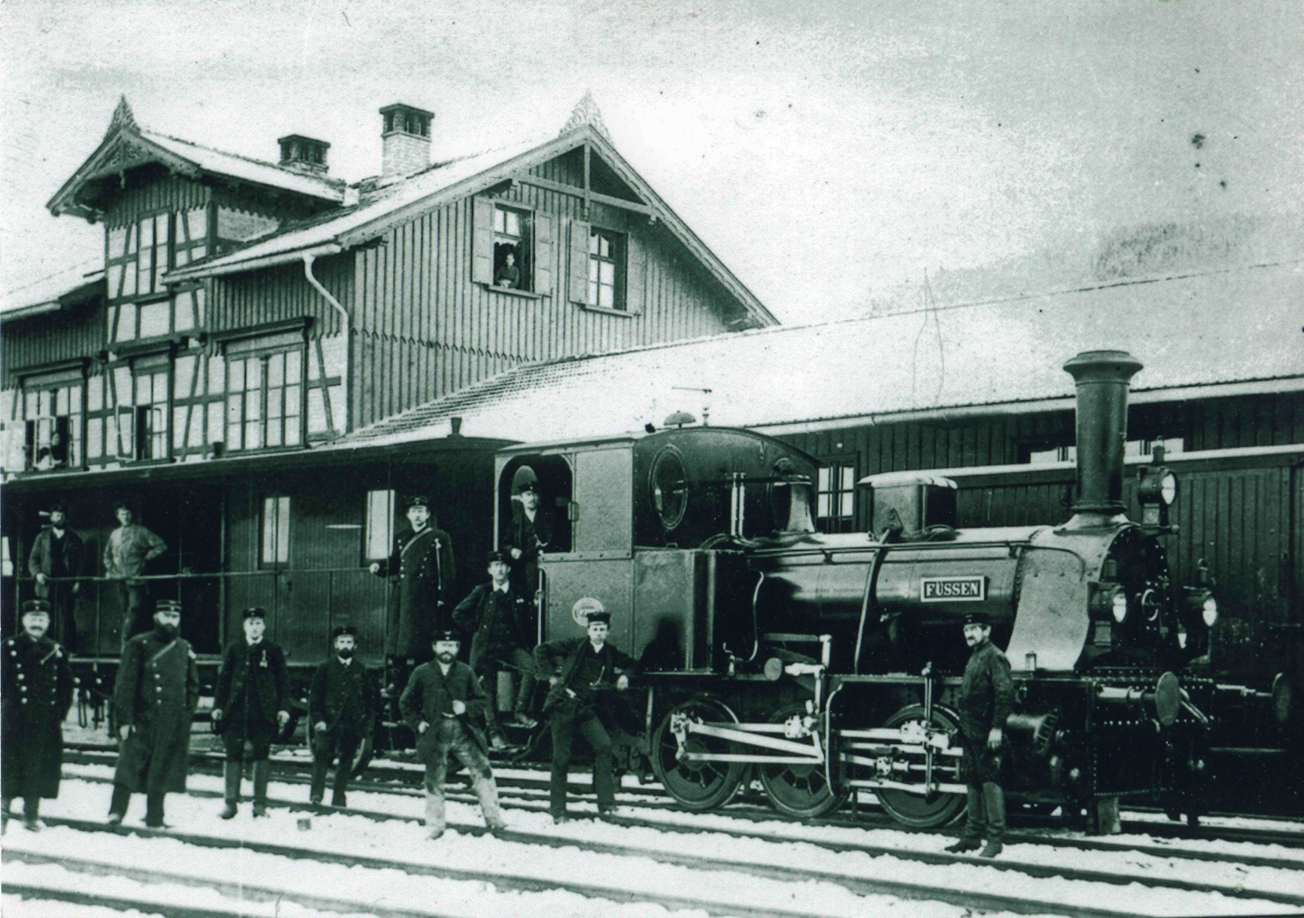 Die FÜSSEN im Einsatz, lt. technischen Dokumenten im Bahnhof Füssen vor 1900